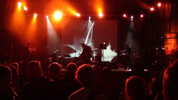 Joanna Slowinska - Archipelag - Main Market Square - Krakow - Poland